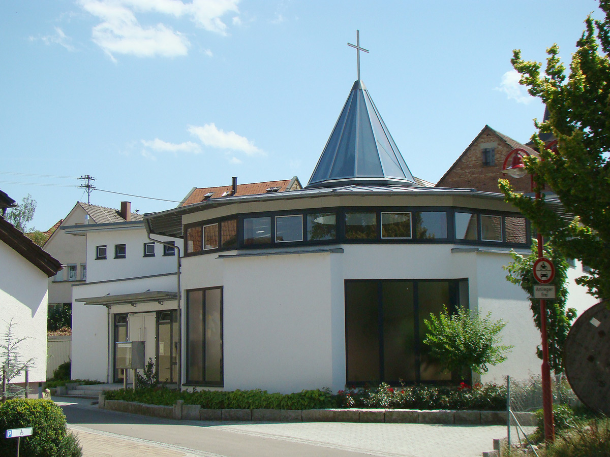 Evangelisch-meth. Kirche in Leingarten